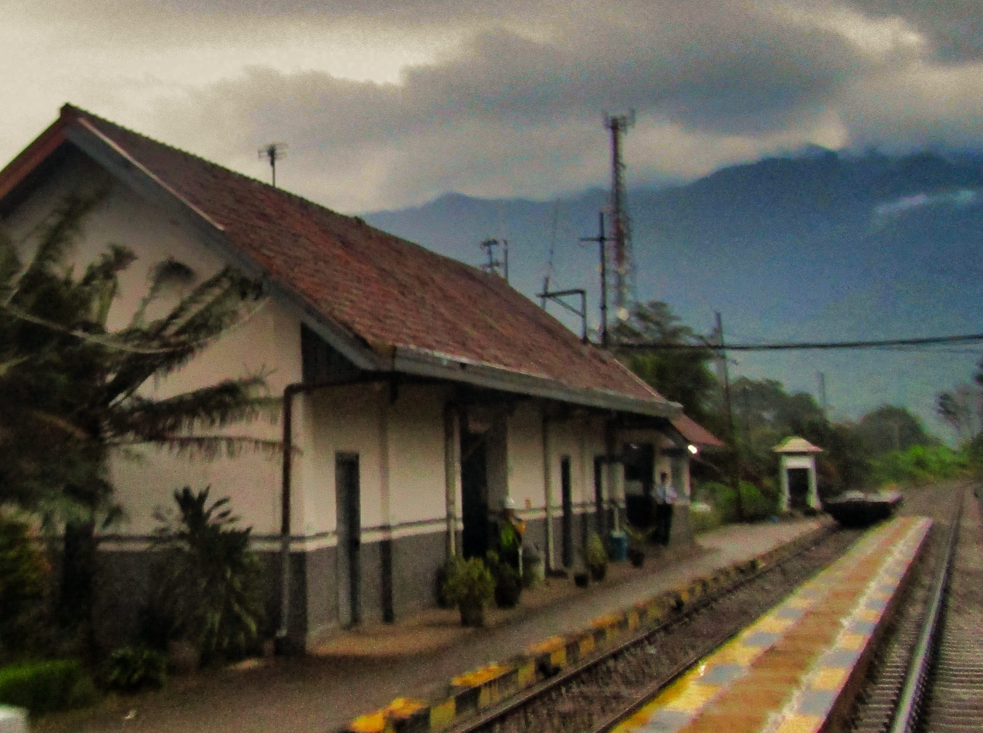 Bangunan Stasiun Bumiwaluya 2020